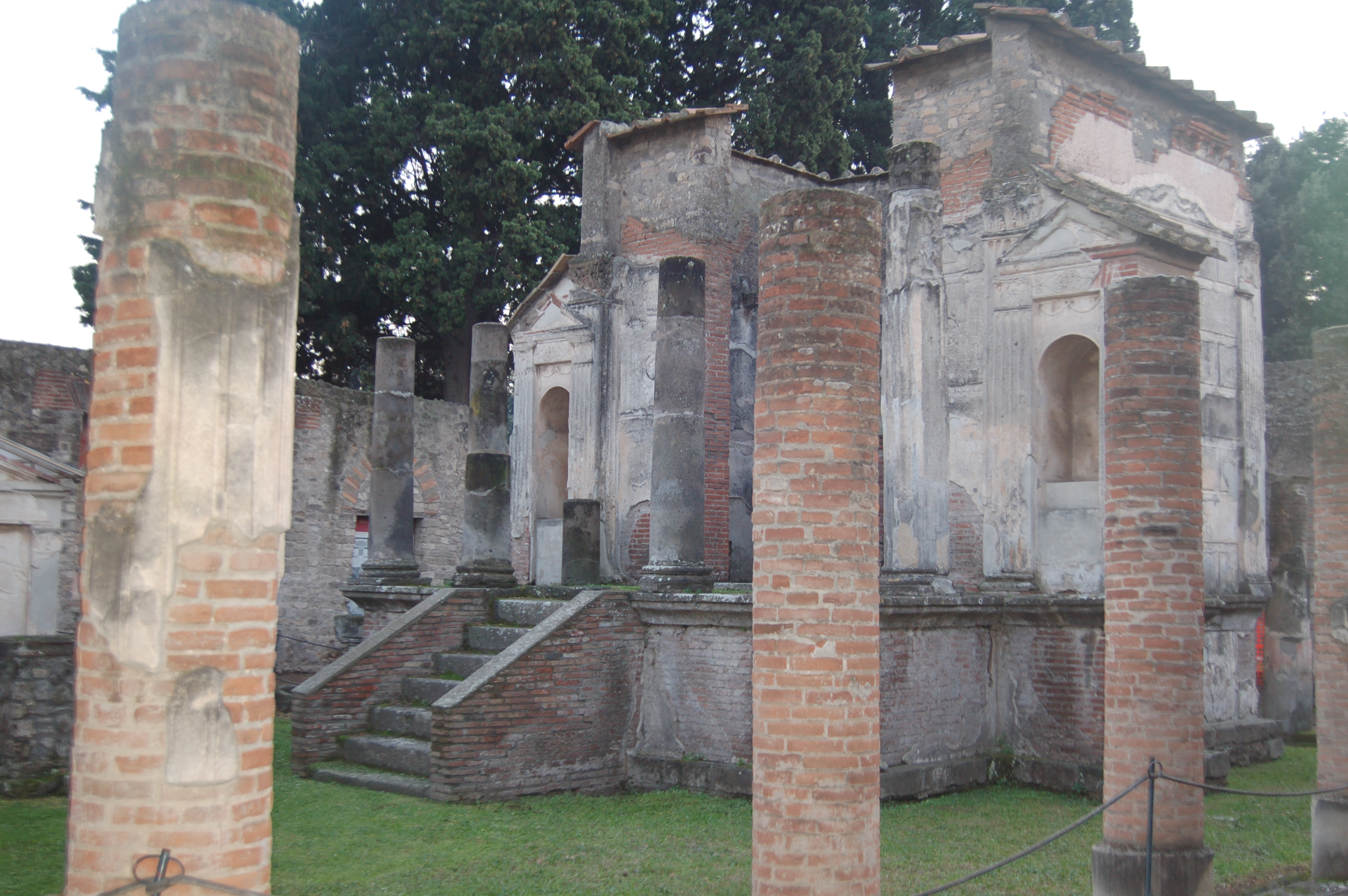 Templo de Isis en pompeya